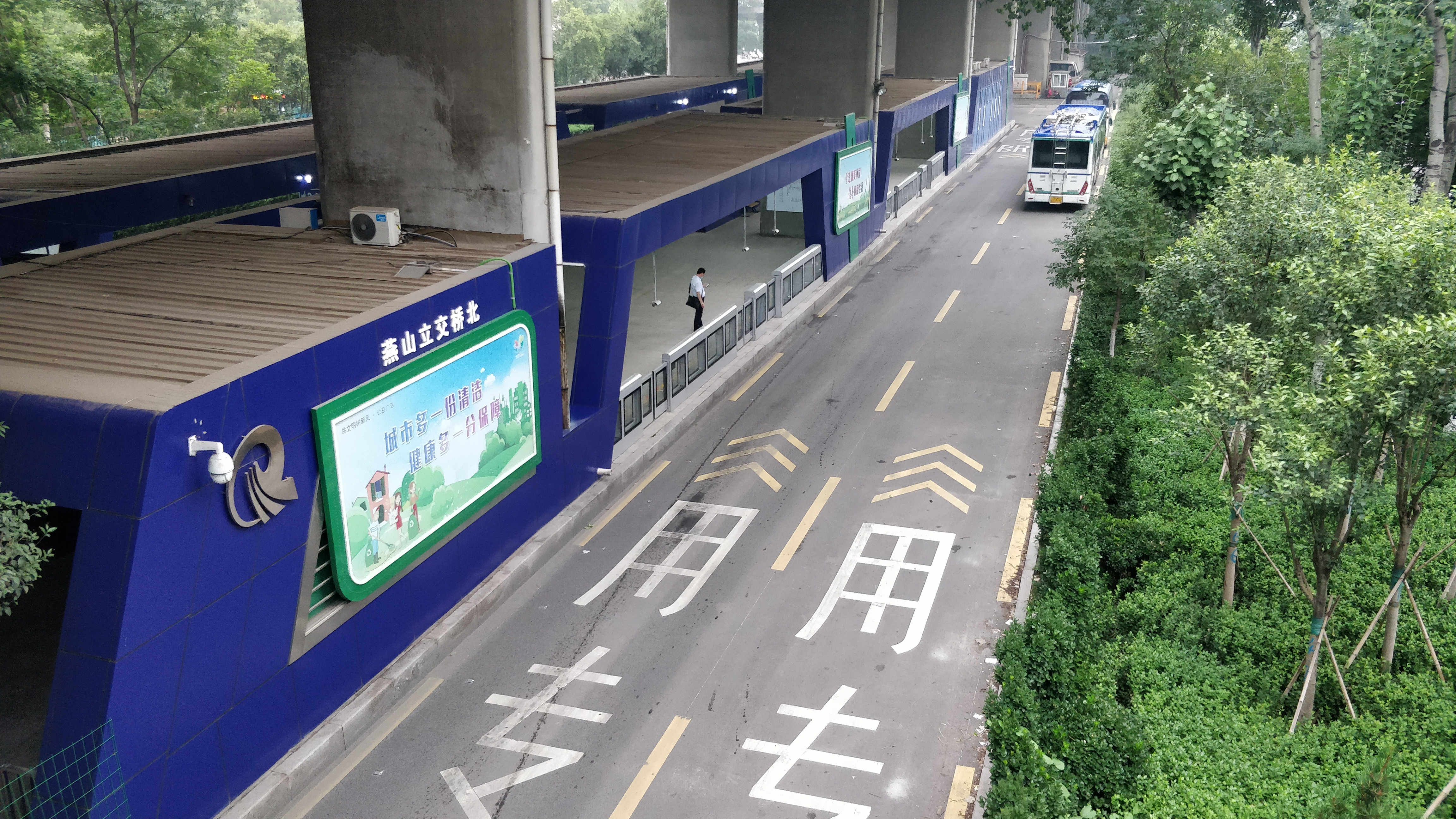 中文（中国大陆）: 济南燕山立交桥下的BRT专用道